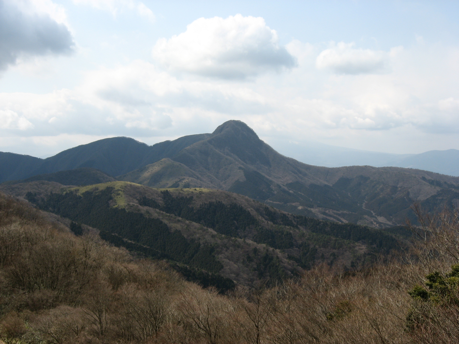 明神ヶ岳付近から金時山